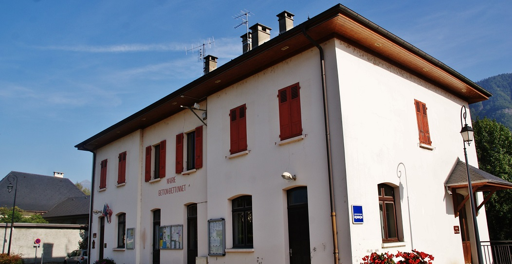 La Mairie